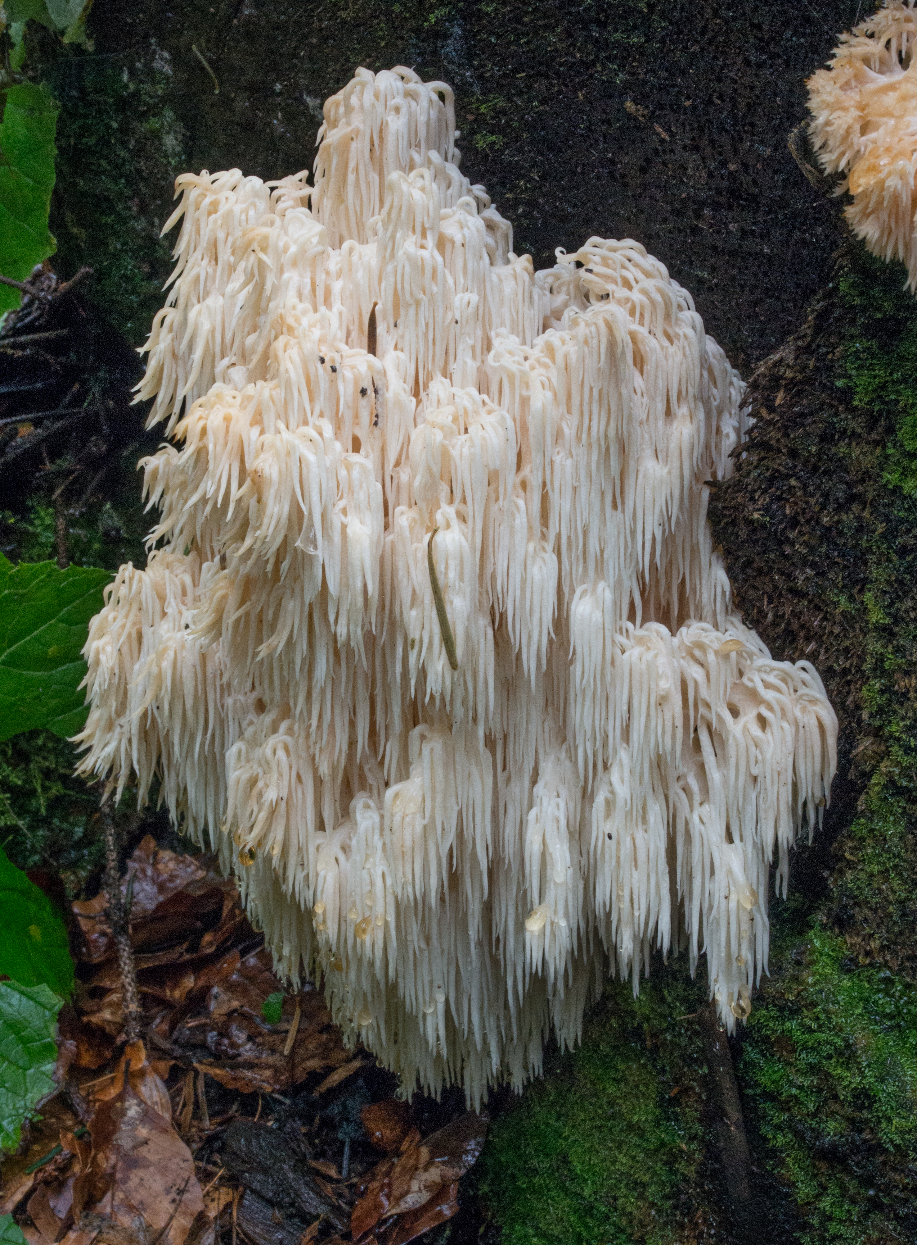 Hericium alpestre near St. Magdalena im Halltal, Karwendel, Tyrol, Austria